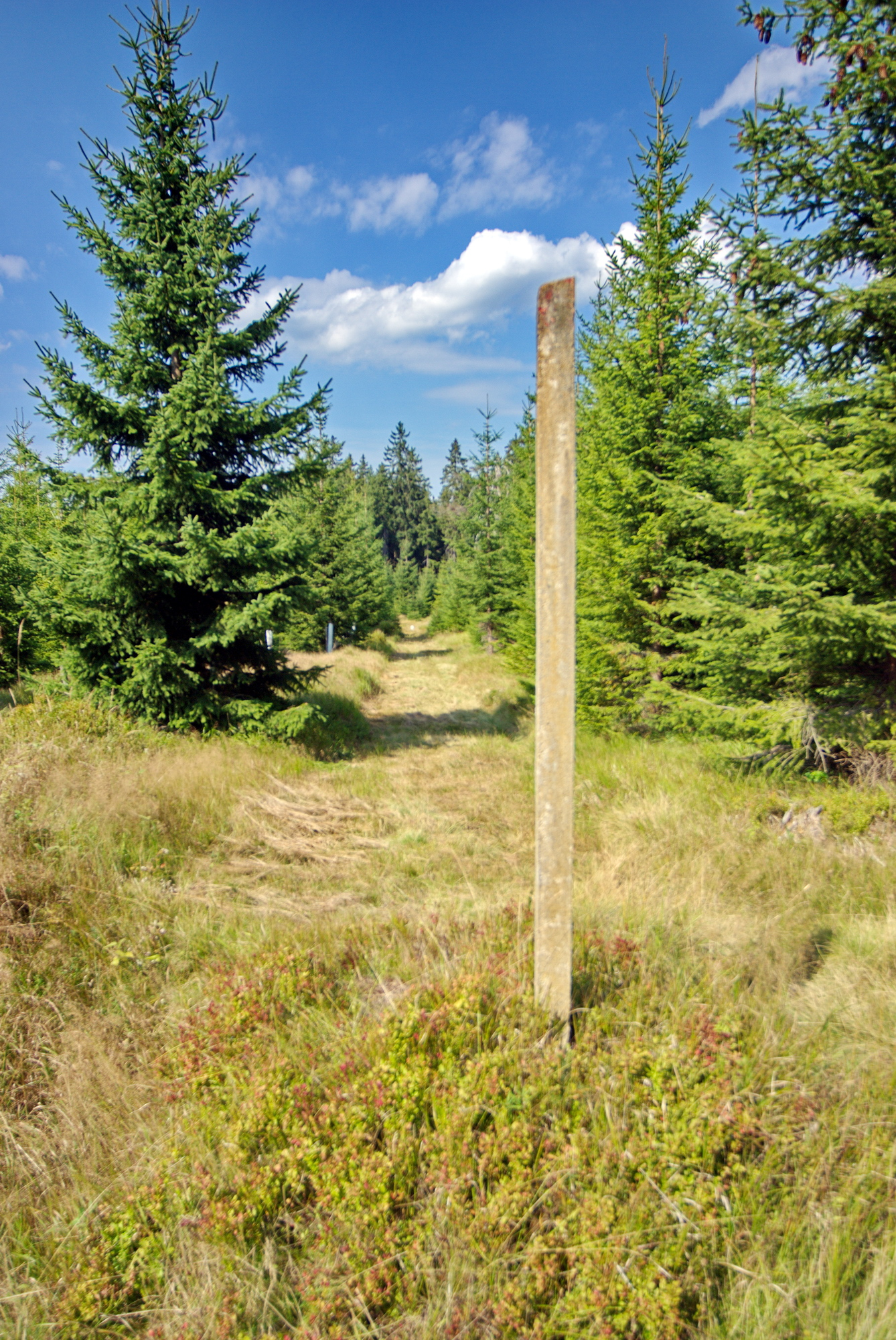 Přírodní rezervace Malé Jeřábí jezero u zaniklé obce Jelení, na státní hranici s Německem, Krušné hory, okres Karlovy Vary